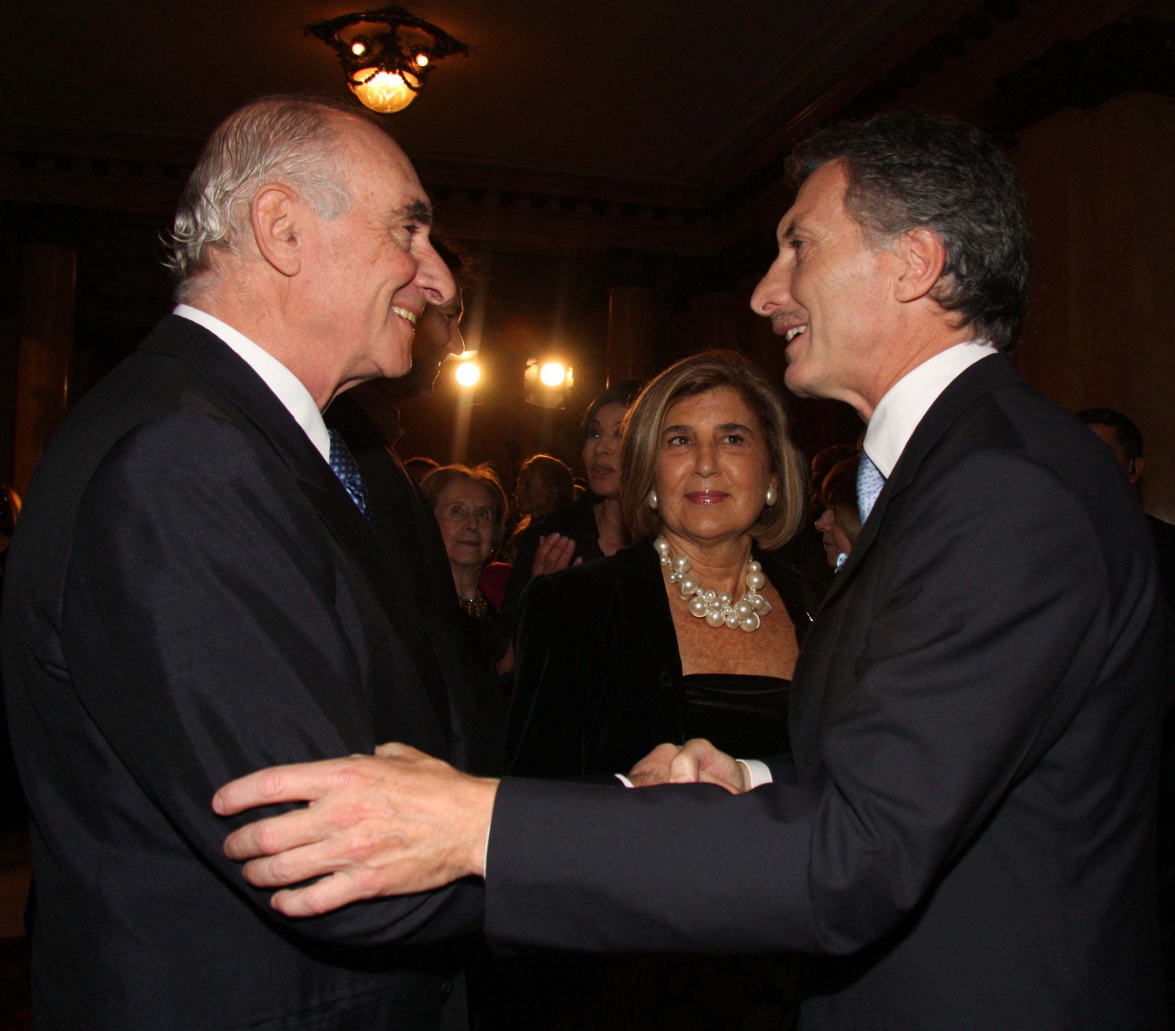 Gala de reapertura del Teatro Colón. Fernando De La Rúa con Mauricio Macri.